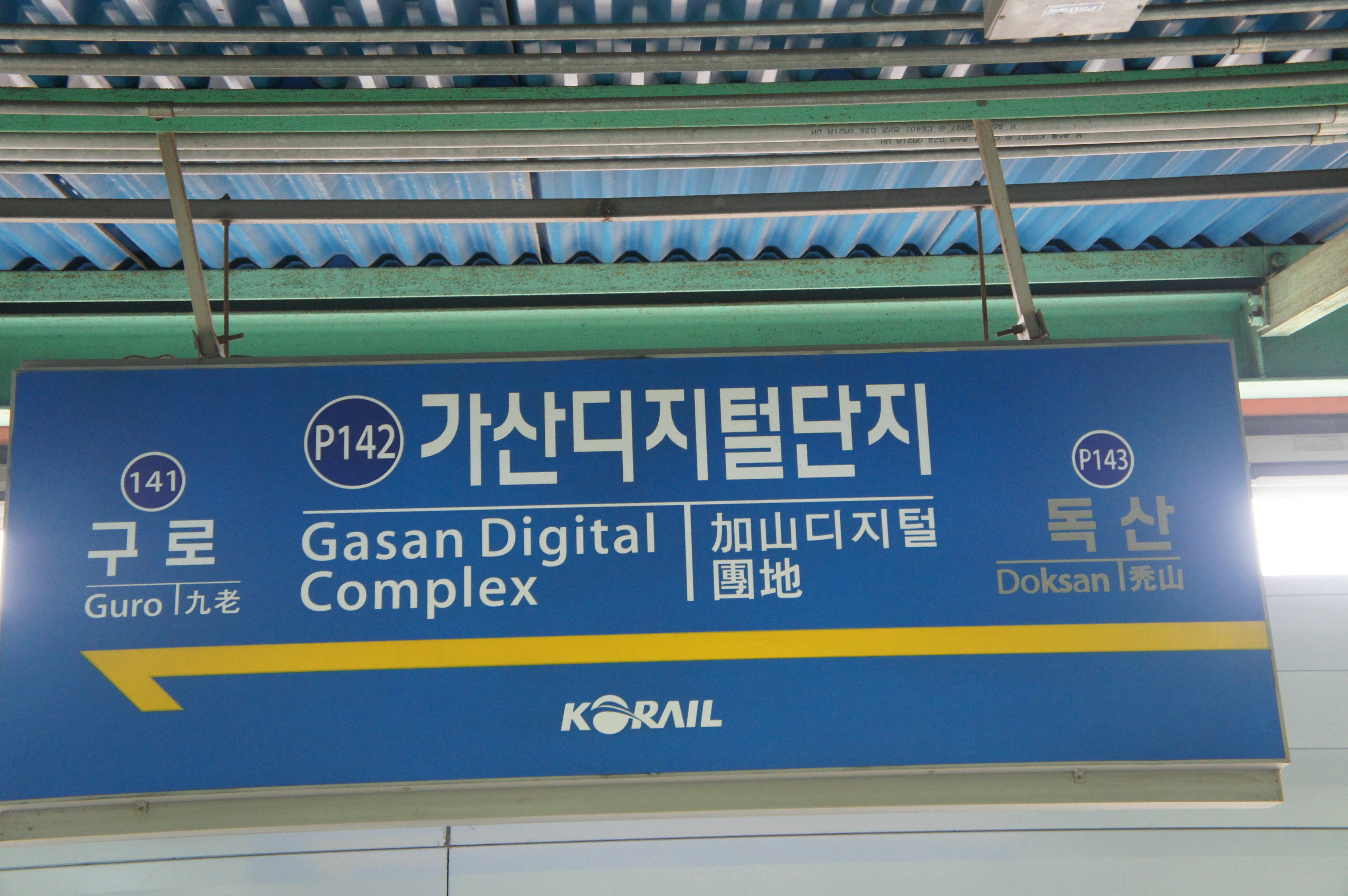 1호선(경부선) 가산디지털단지역 역명판